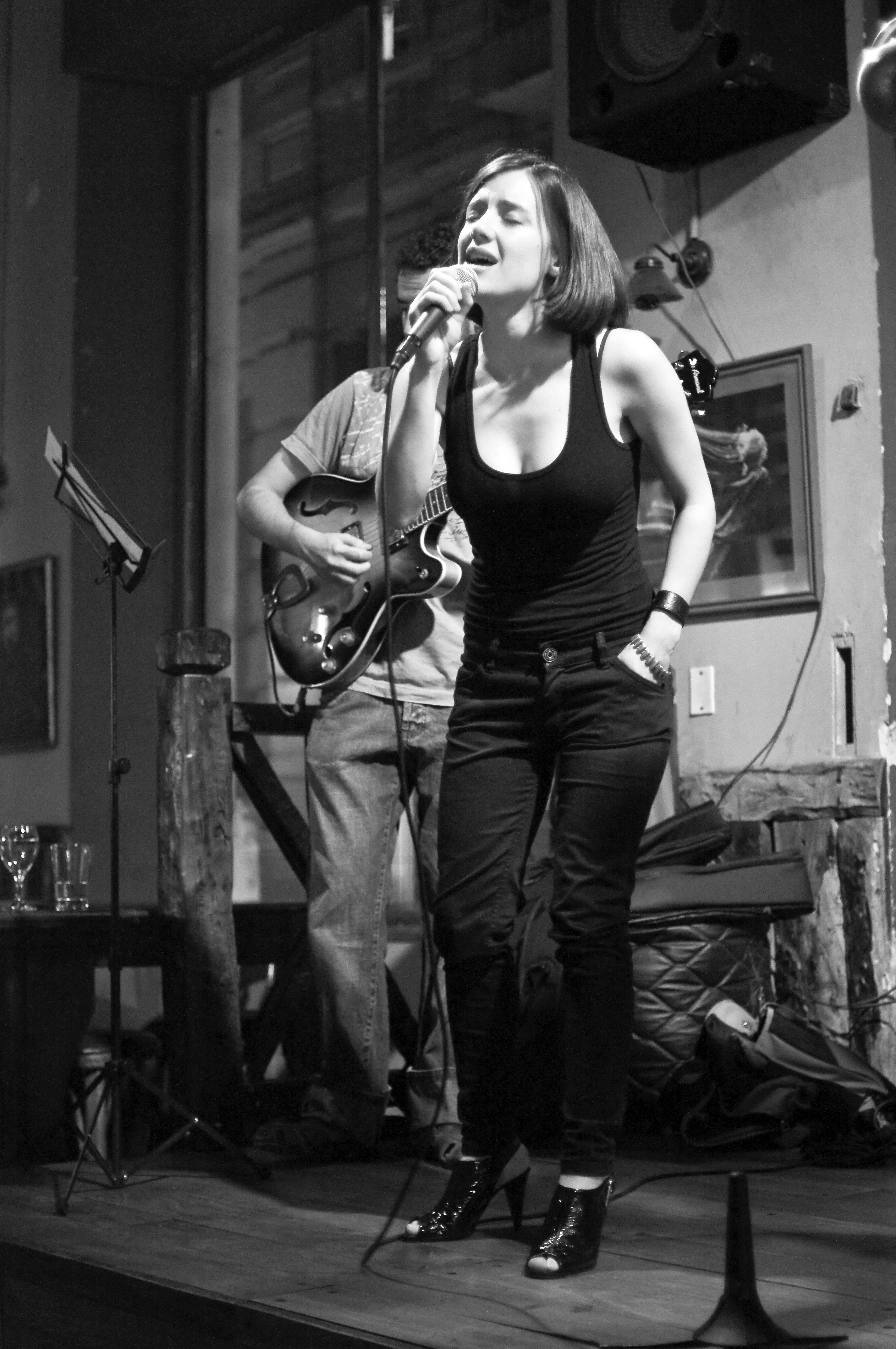 Malena Pichot, cuando era cantante en una banda de jazz. Bartolomeo Bar Diciembre 2008